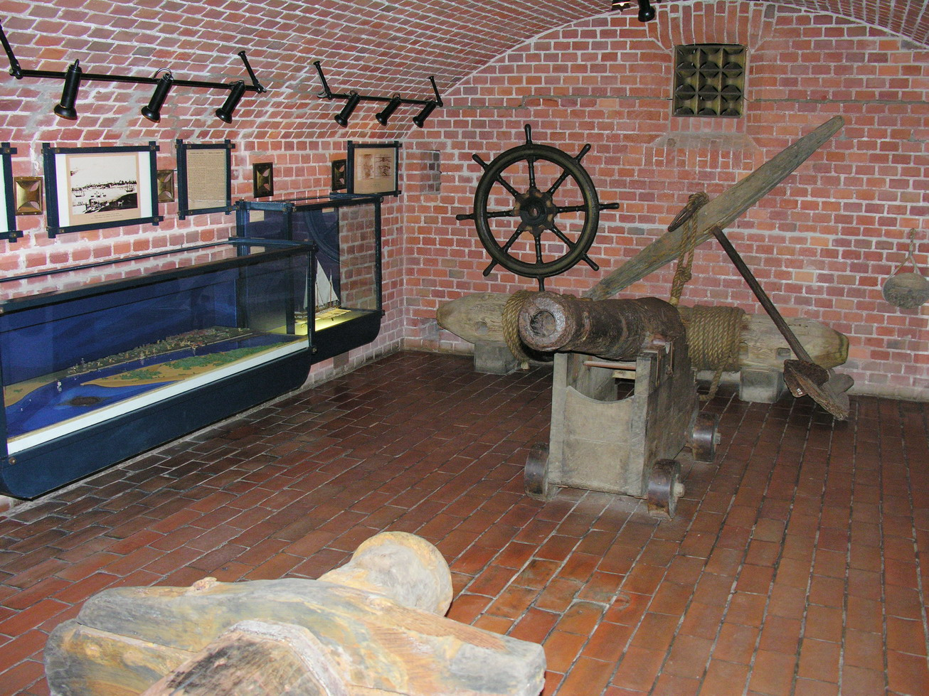 Lietuvos jūrų muziejus Foto: Algirdas, 2006 m. birželio 29 d.